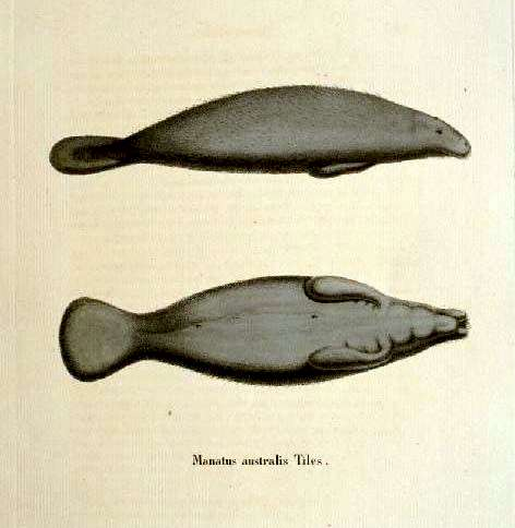 Manatus australis = Trichechus manatus Fossilworks PaleoDB link: Manatus australis Tilesius 1830